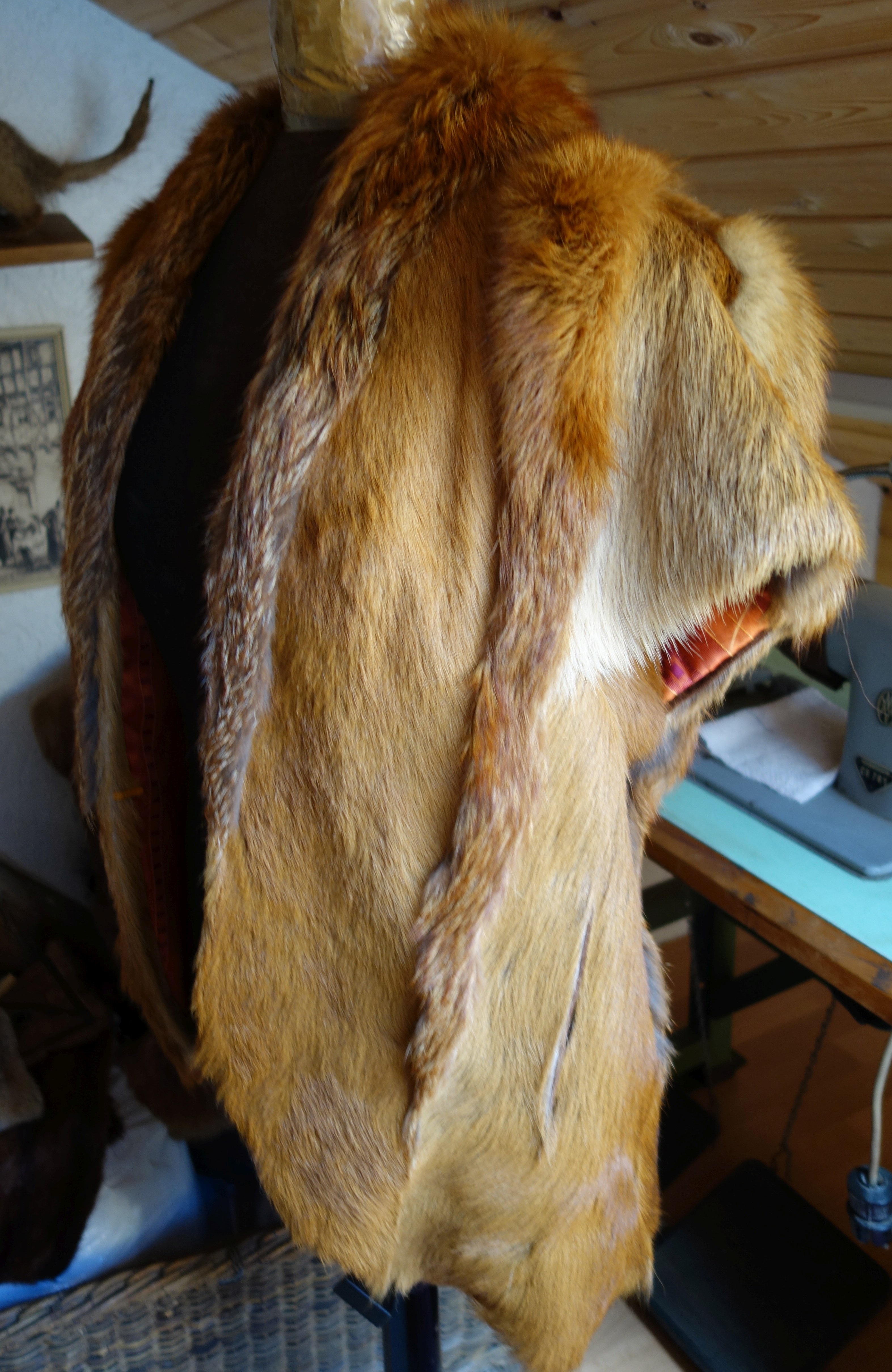 Weste aus Sommer-Rehfell und Rotfuchs. Gesehen in der Kürschnerei und Pelz-Zurichterei Udo Meinelt & Söhne, Rötha.